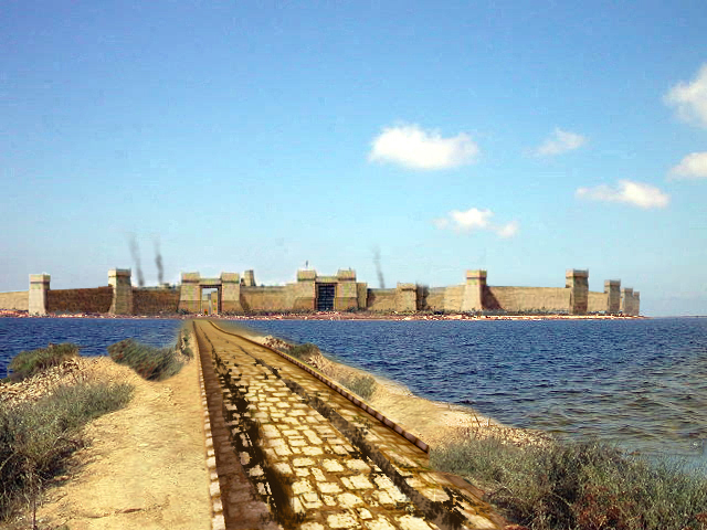 Ricostruzione del lato nord della città di Mozia.